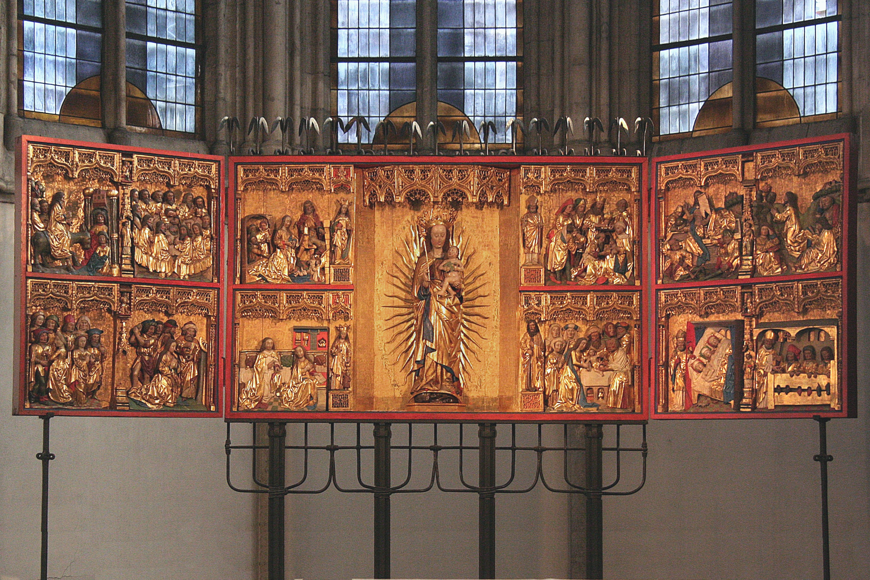 Retabel des Hochaltars, 15. Jahrhundert, ehemals Alfeld